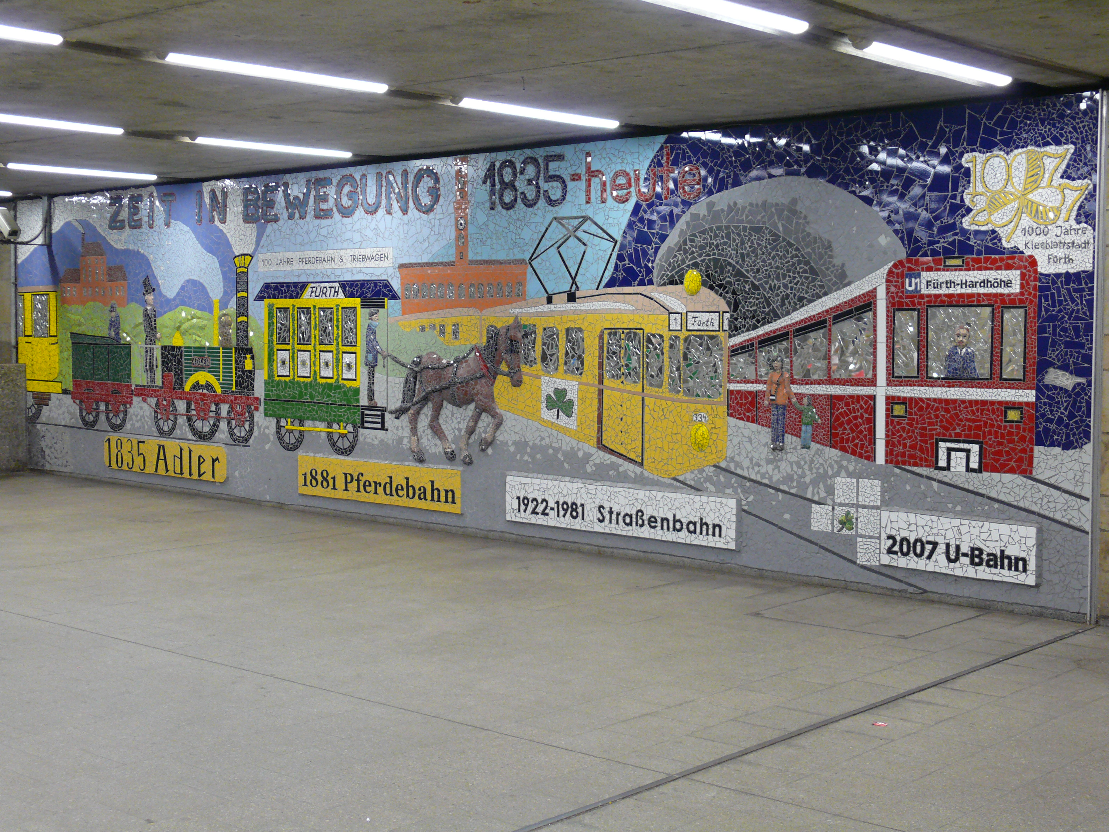 Wandmosaik im Verteilergeschoss am U-Bahnhof Jakobinenstraße in Fürth. Es zeigt den Weg vom "Adler", über die Pferdebahn, die Strassenbahn, bis hin zur U-Bahn.